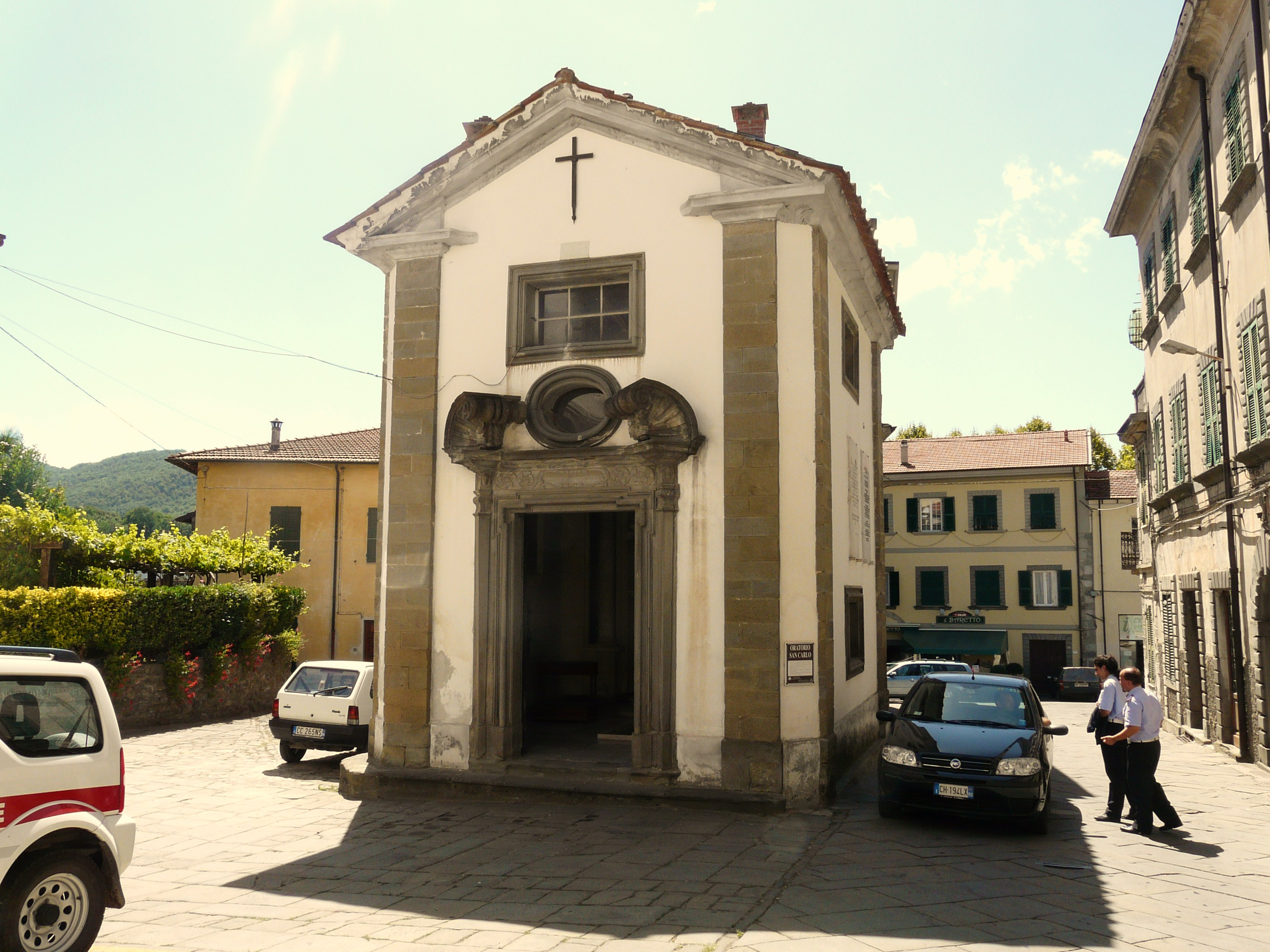 Oratorio di San Carlo, Fivizzano, Toscana, Italia